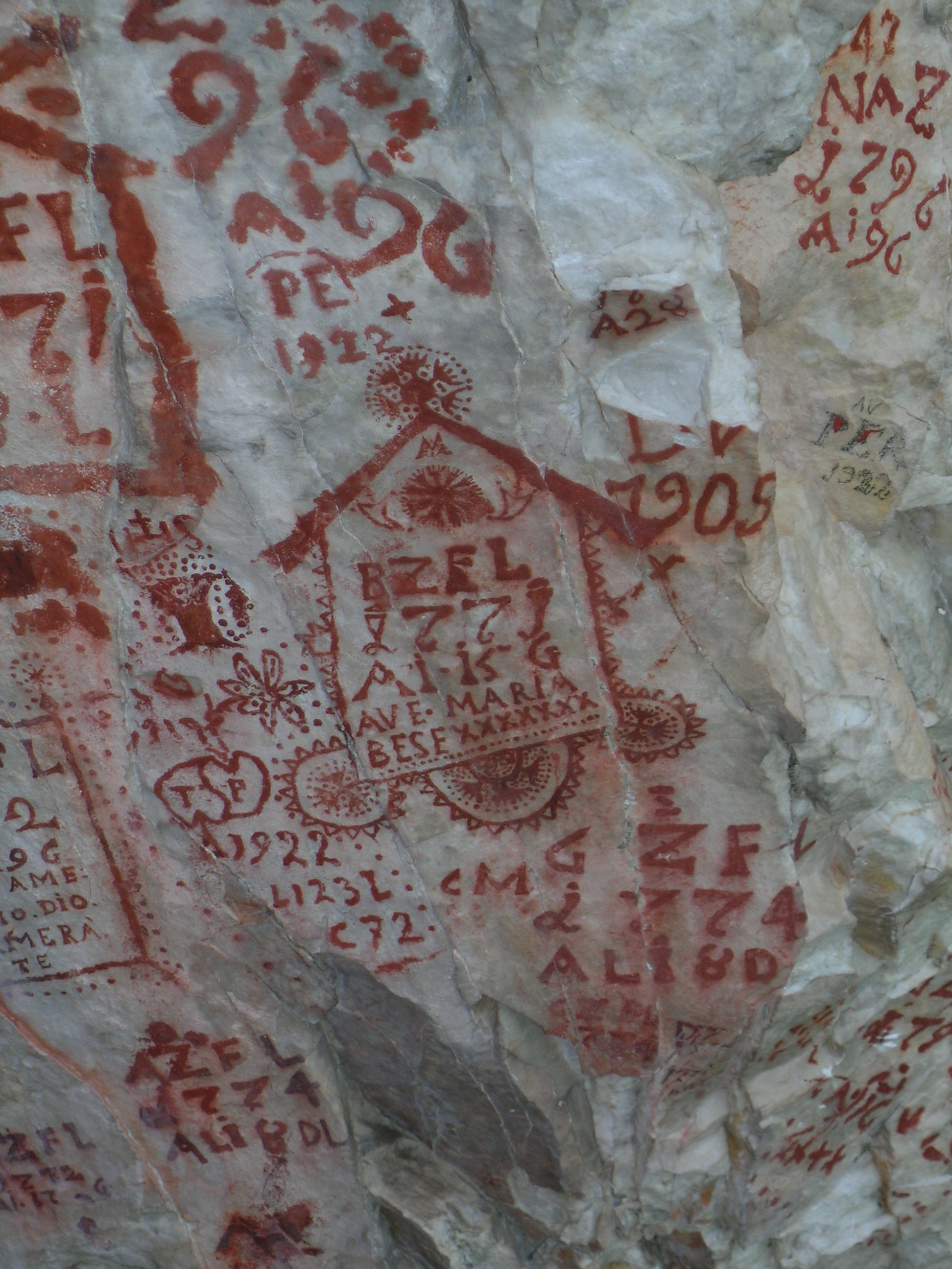 Parete Corosso dei Moni